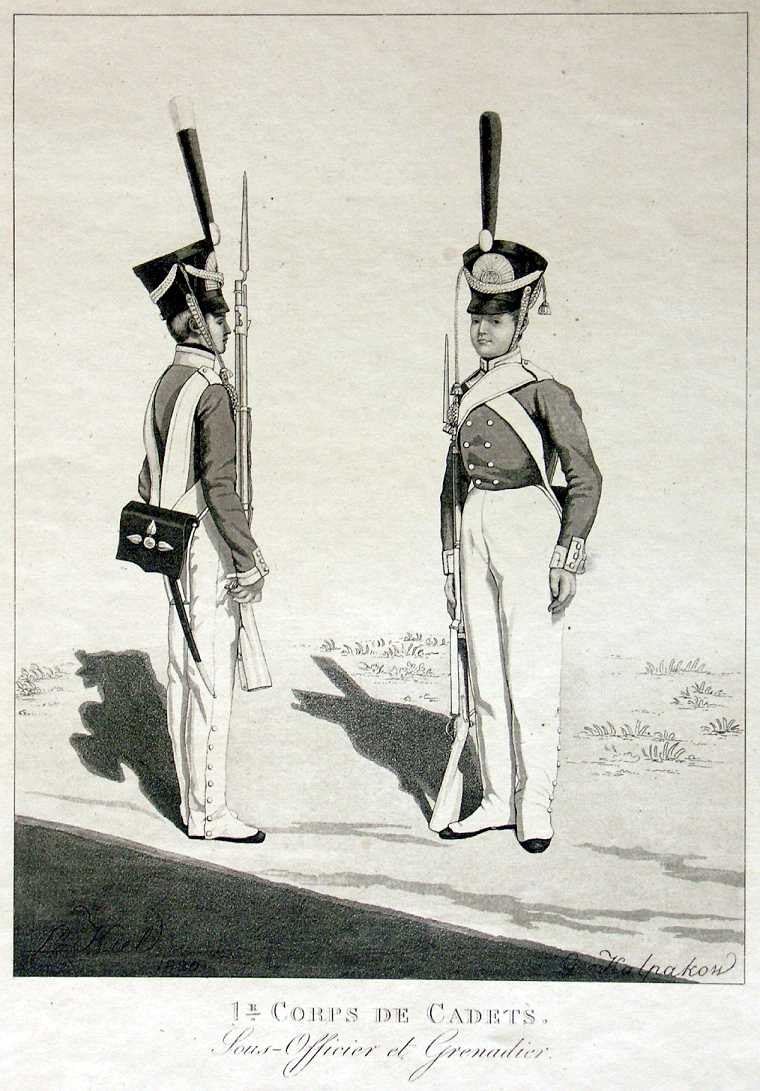 Кадеты_1-го_Кадетскаго_корпуса